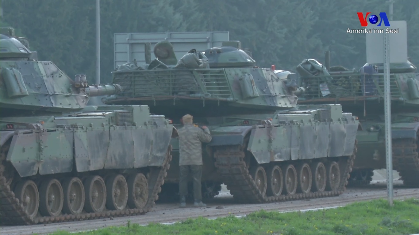 “Zeytin Dalı Harekatı" Afrin’deki hedefleri bombalanmasıyla başladı. Hatay’ın Reyhanlı ve Kırıkhan ilçeleri arasındaki sınır hattında 2. Ordu Komutanlığına bağlı birliklerden gelen çok sayıda tank ve zırhlı araç ikinci bir emre kadar yol boyunca bekletiliyor.